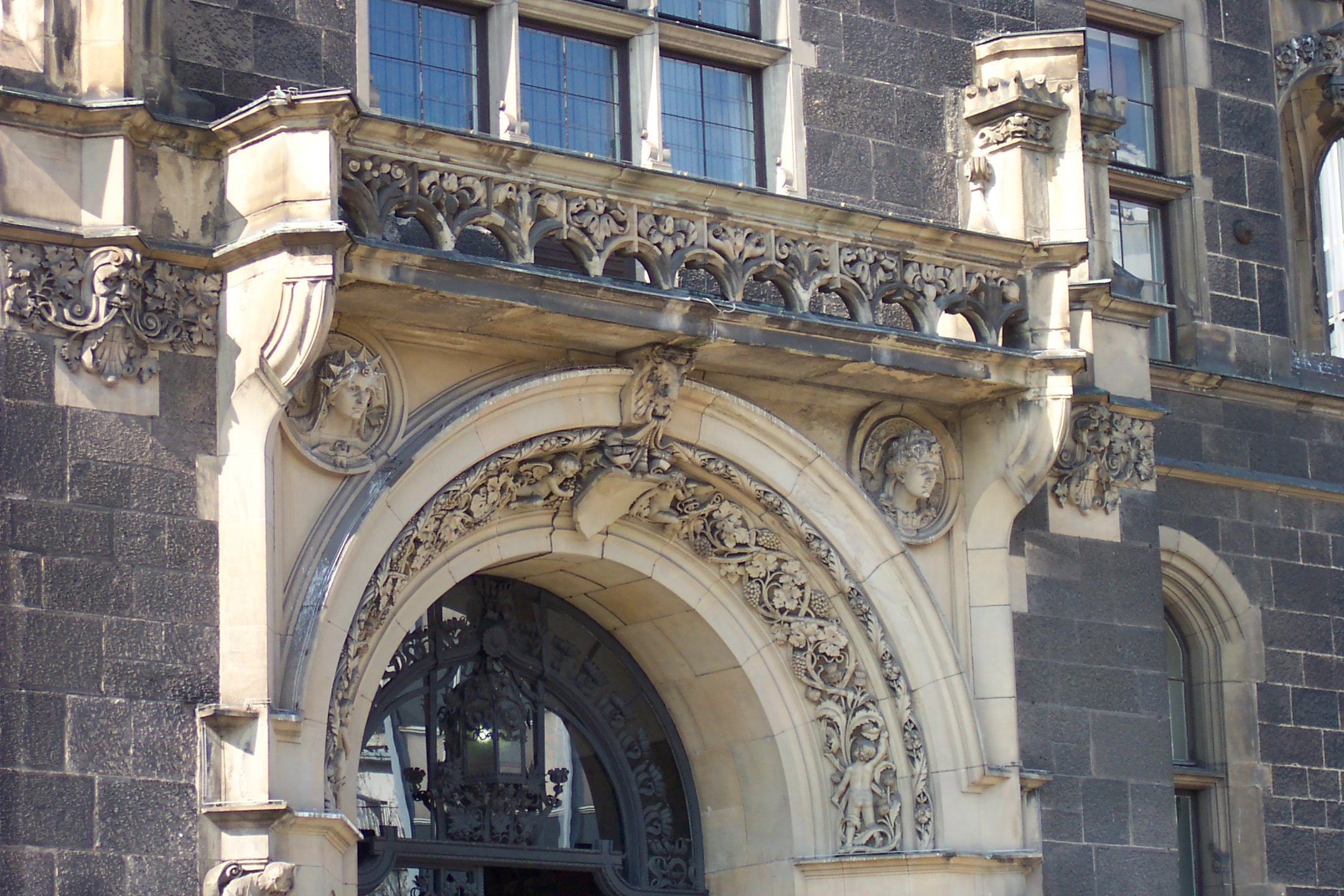 Wuppertal Elberfeld, Rathaus Elberfeld